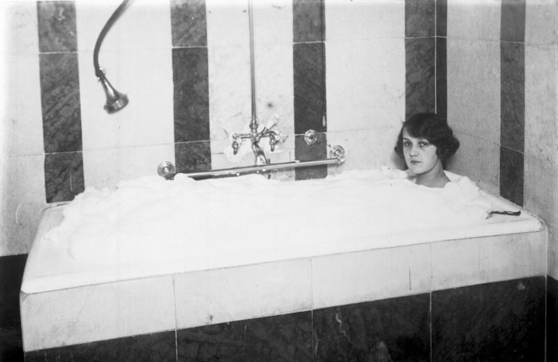 Schaum macht schön! Eine Berlinerin im Schaumbad. Schaum soll Schönheit geben und erhalten, wird behauptet. Da hätte also der griechische Mythos recht, denn die schönste Göttin des Olymps, die Göttin der Liebe, war Aphrodite, die "Schaumgeborene".